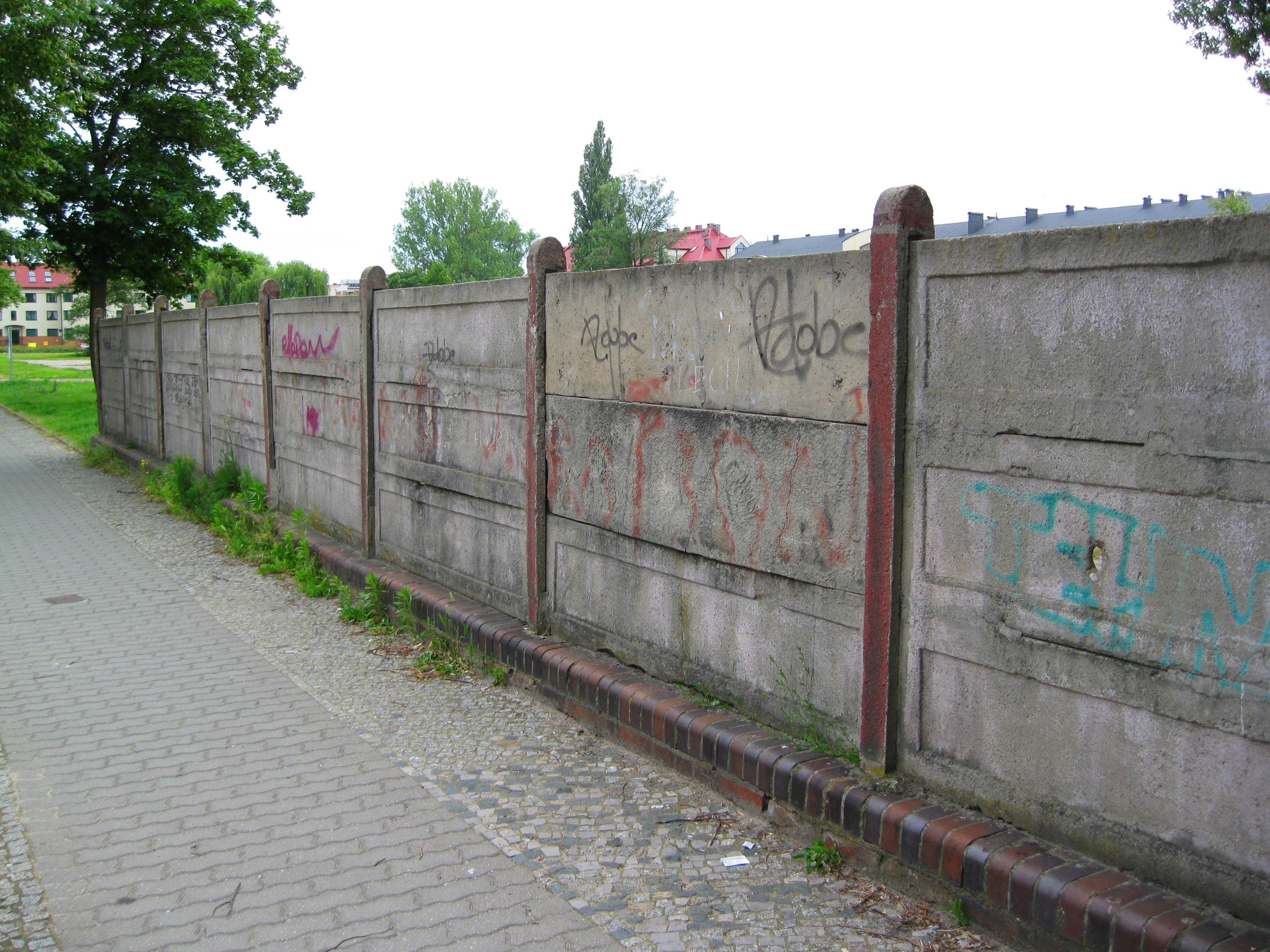 Parkan dawnych zabudowań koszarowych w Słubicach.